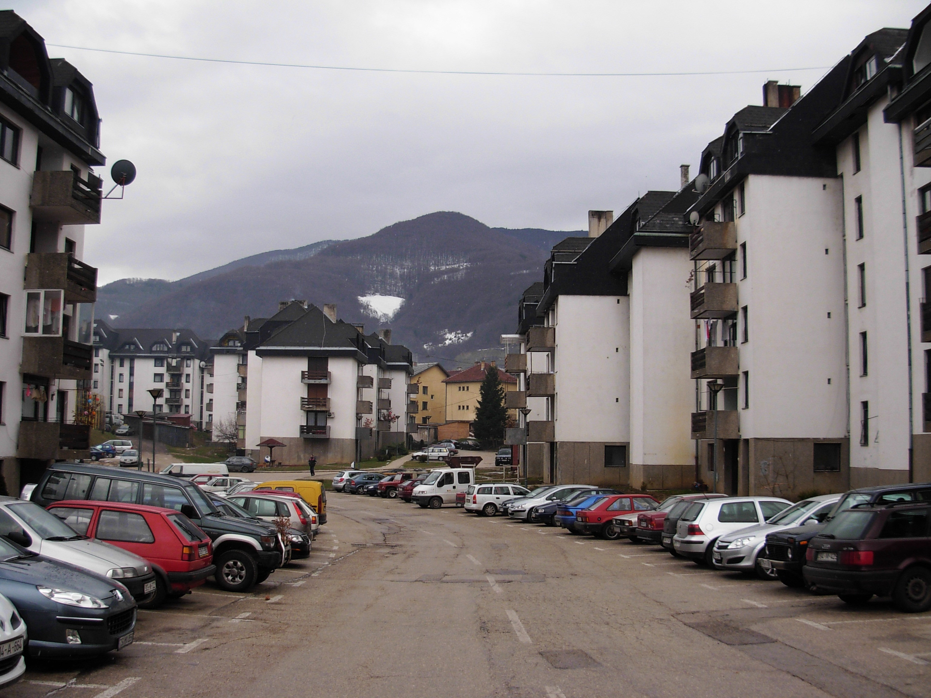 Naselje Brkića Bašta, opština Mrkonjić Grad.